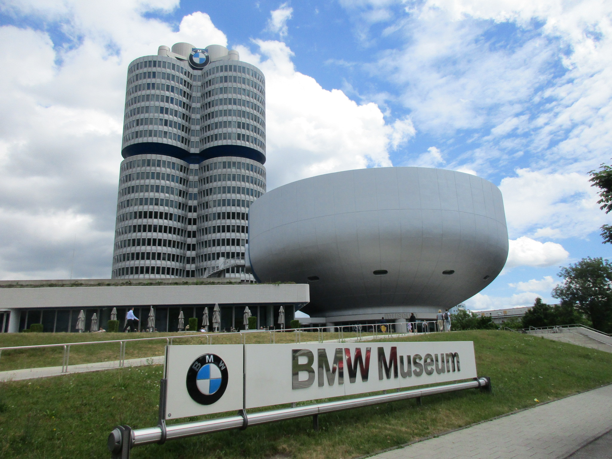 Musée et tour BMW